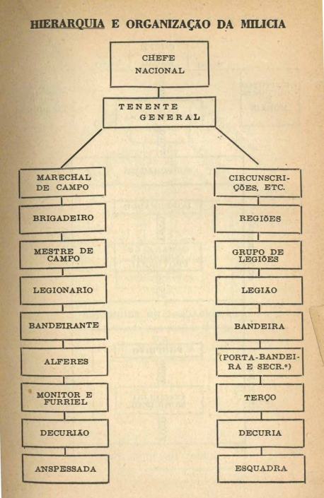 Contém a hierarquia e organização da milícia